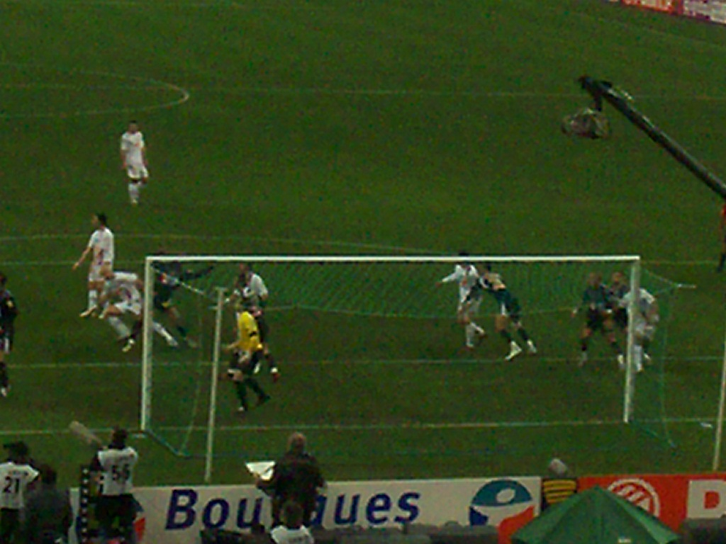 Finale de la Coupe de la Ligue 2007 : Lyon - Bordeaux, au stade de France